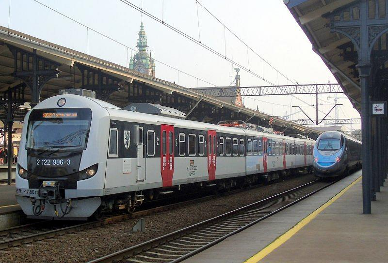 Elektryczne zespoły trakcyjne EN57AL-1786 i ED250-010 stoją na stacji Gdańsk Główny.